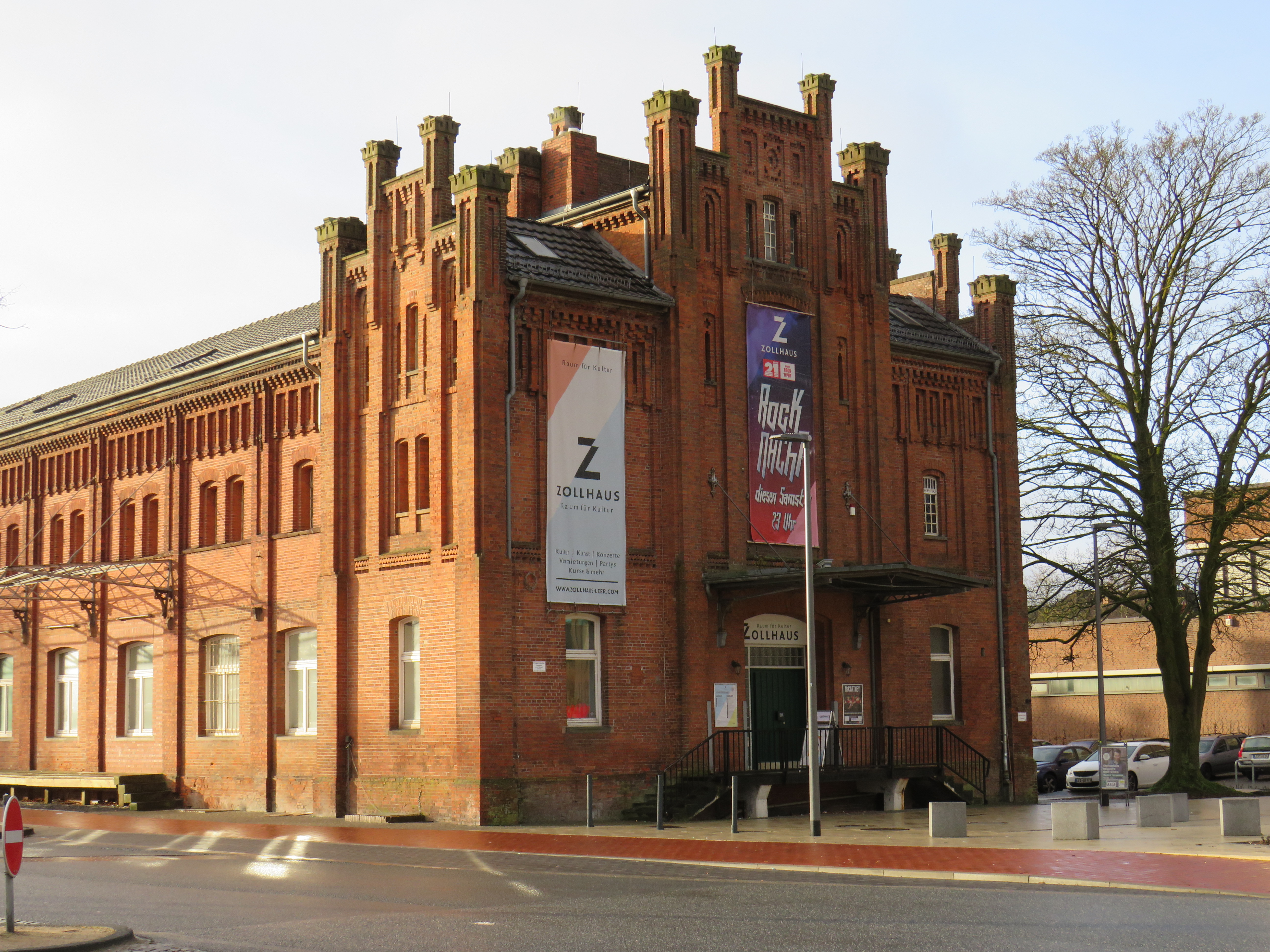 Altes Zollhaus in Leer Ostfriesland